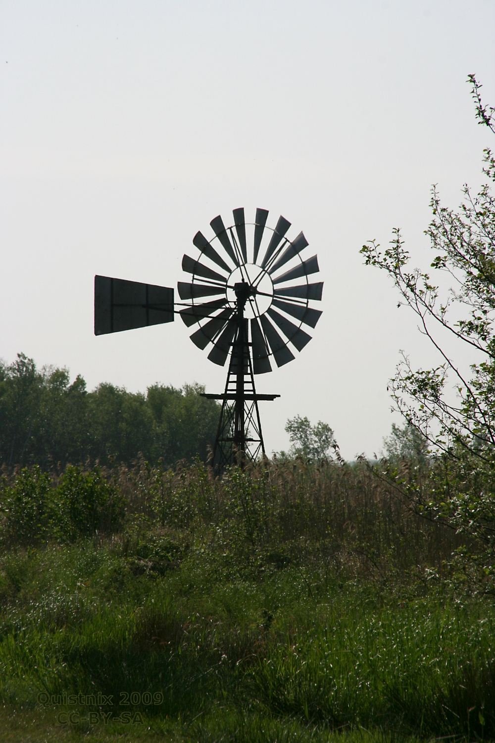 Nijetrijne: Windmotor nr 7